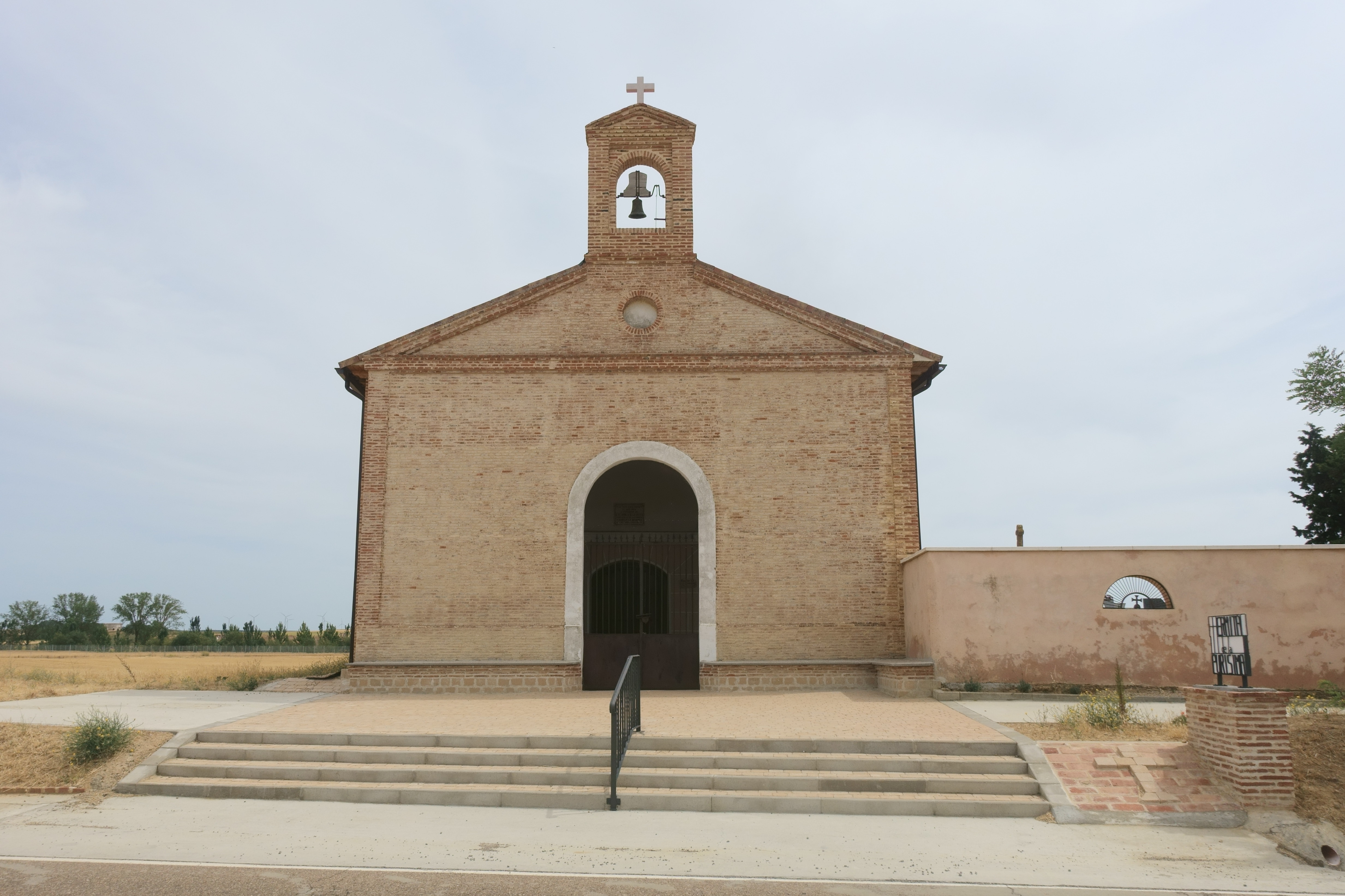 Ermita de la Purísima, Villatoquite (Palencia, España).